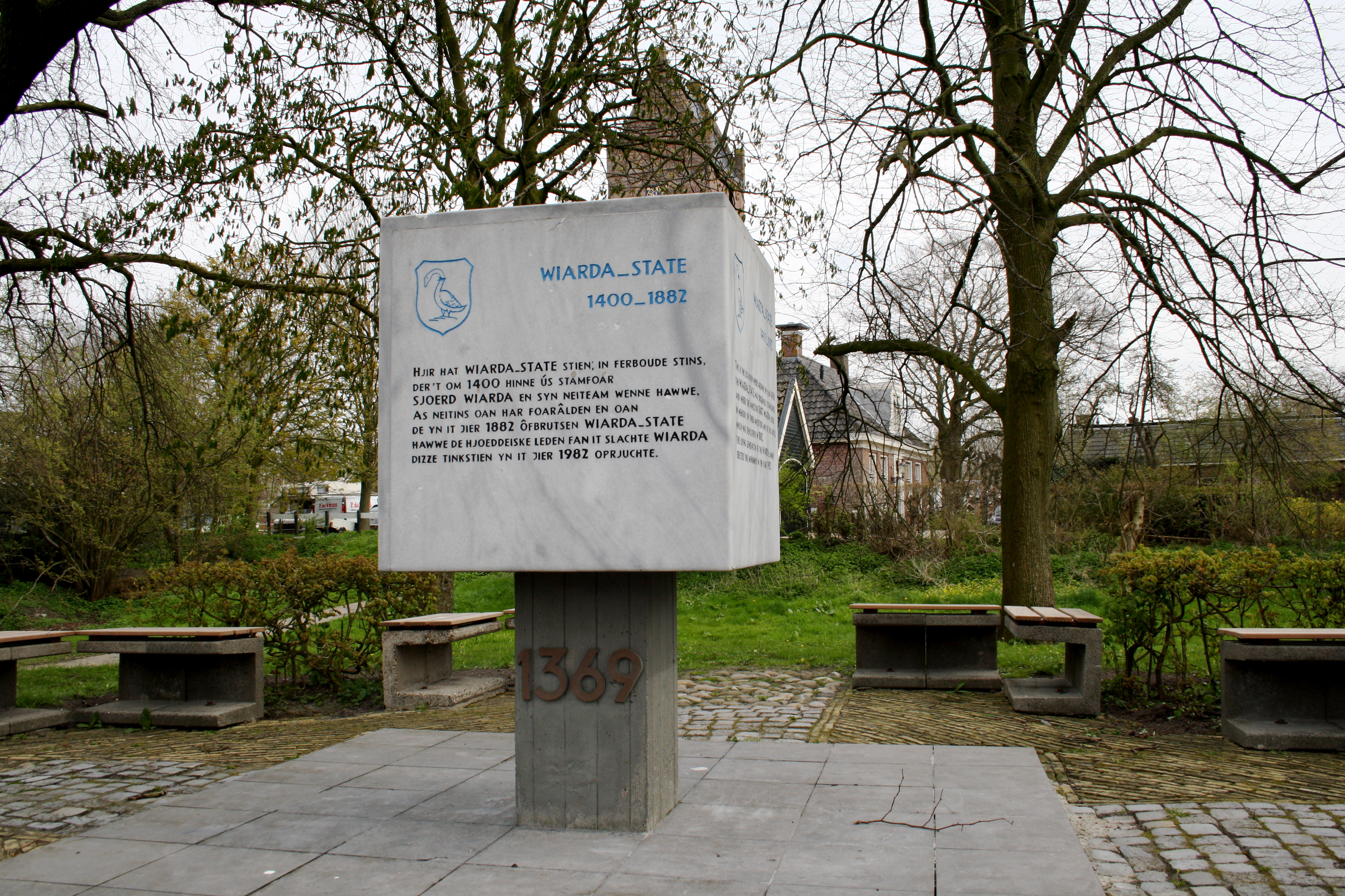 Tio Wiarda,1983